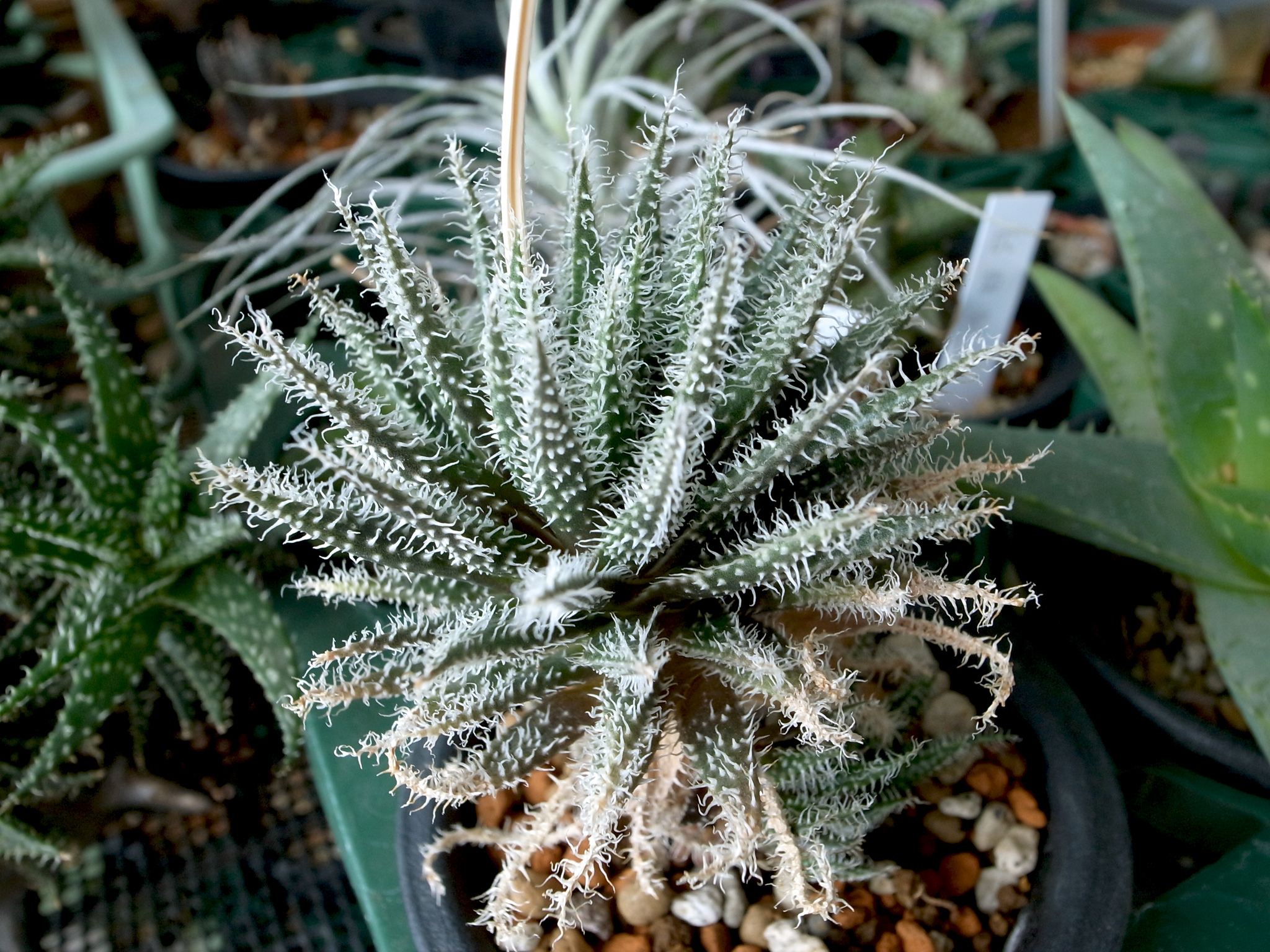 アロエ・ハオルチオイデス Aloe haworthioides